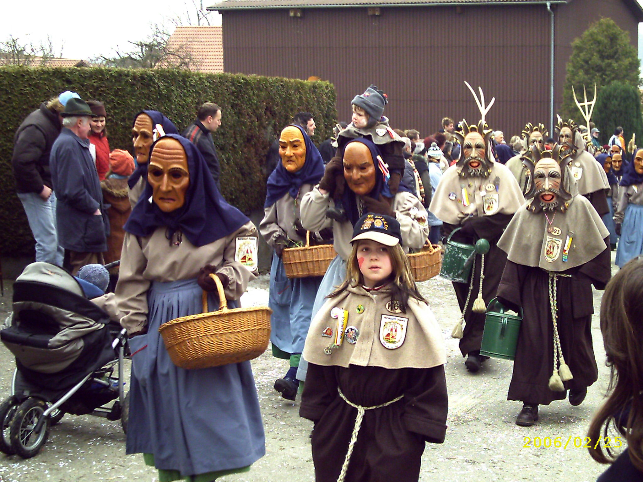 Narrenumzug Zell 2006